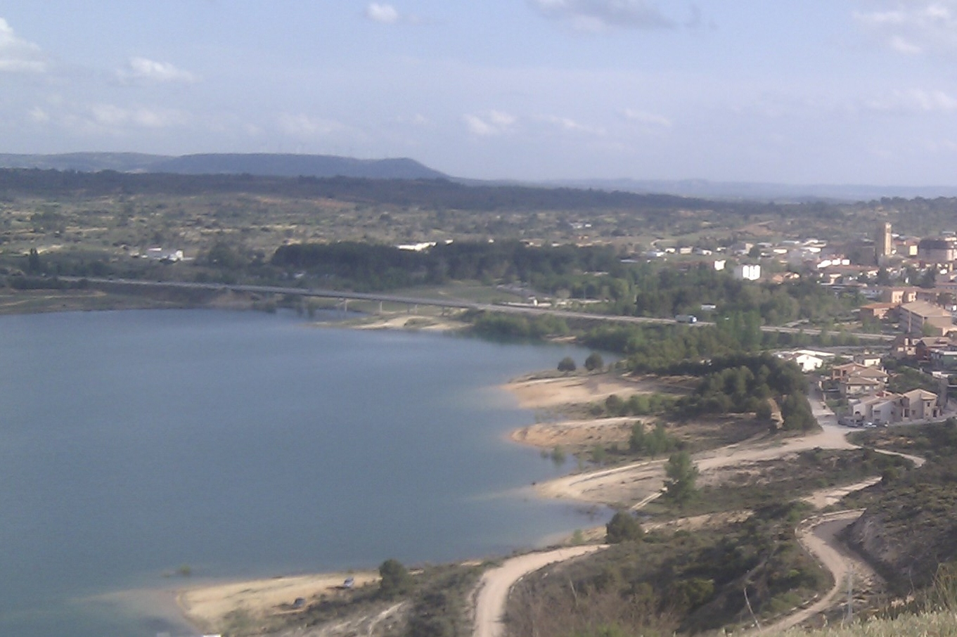 Vista parcial de Sacedón, Guadalajara.